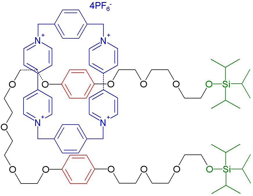 Shuttle 1/2 x-2345x574.000